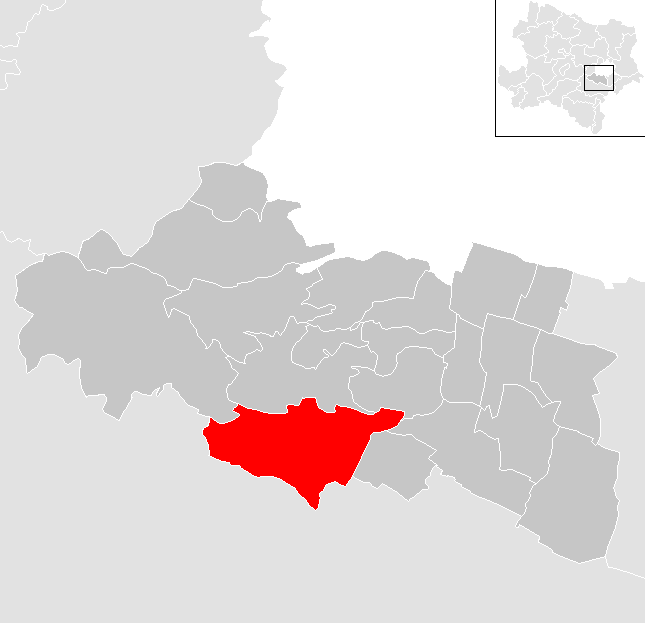 Bezirk Mödling